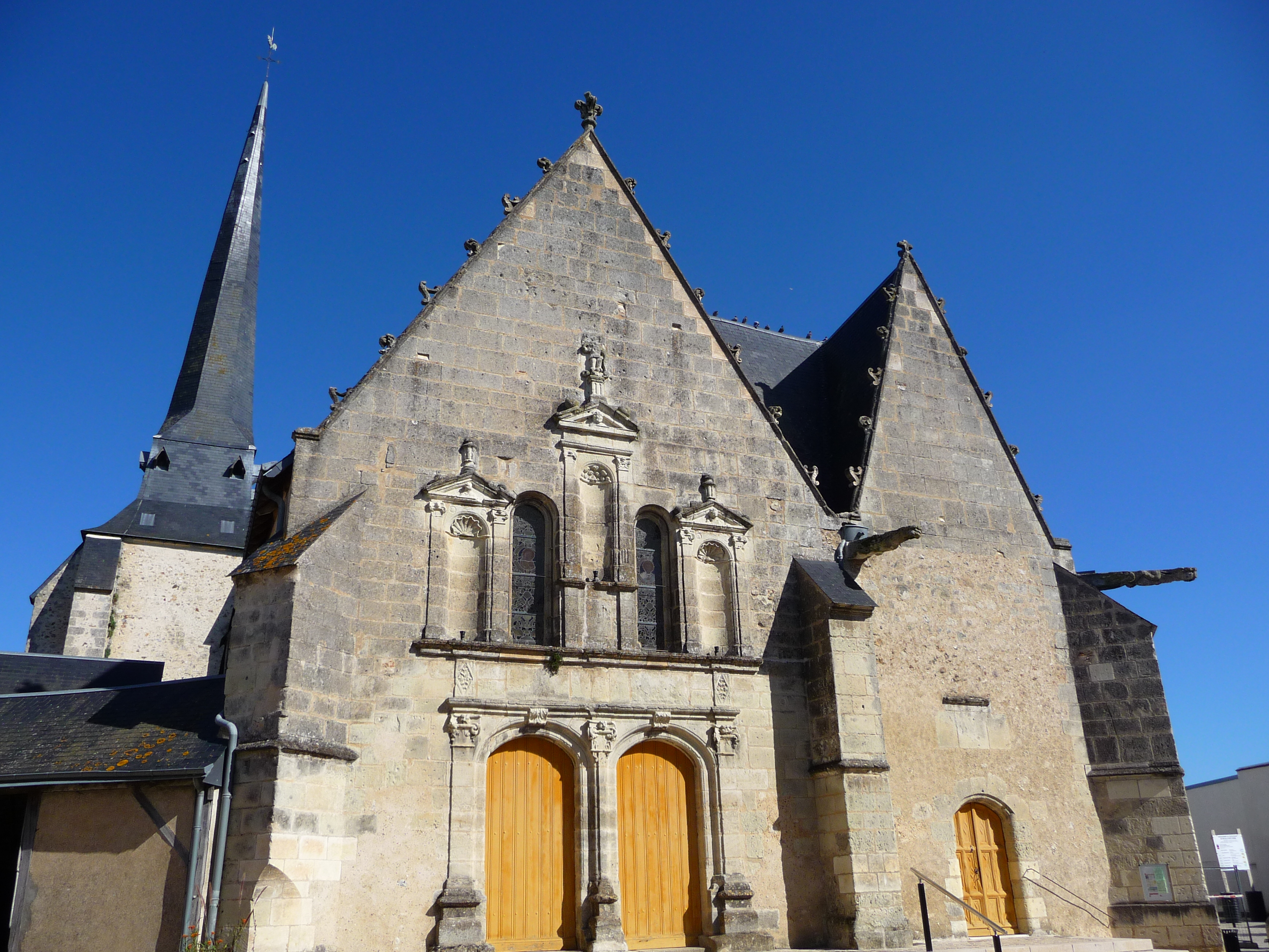 Eglise Saint-Pierre, Neuillé Pont Pierre (37)